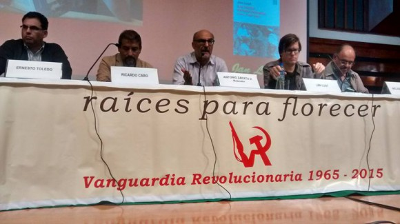 Acto conmemorativo por el quincuagésimo aniversario de la fundación de Vanguardia Revolucionaria.